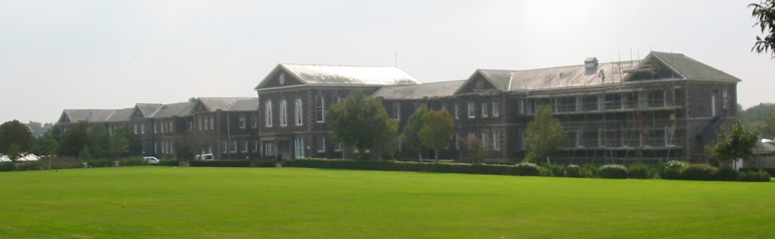 Nrf: Jèrri